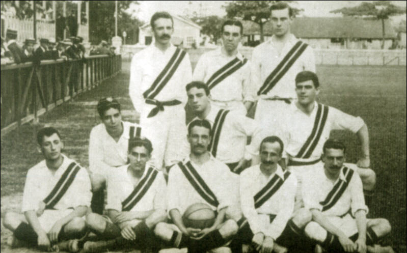 Foto inédita do time Campeão Carioca de 1907, tirada no dia 27/10/1907, último jogo do Flu no Campeonato Carioca: 2 x 0 no Paissandu Atletico Clube